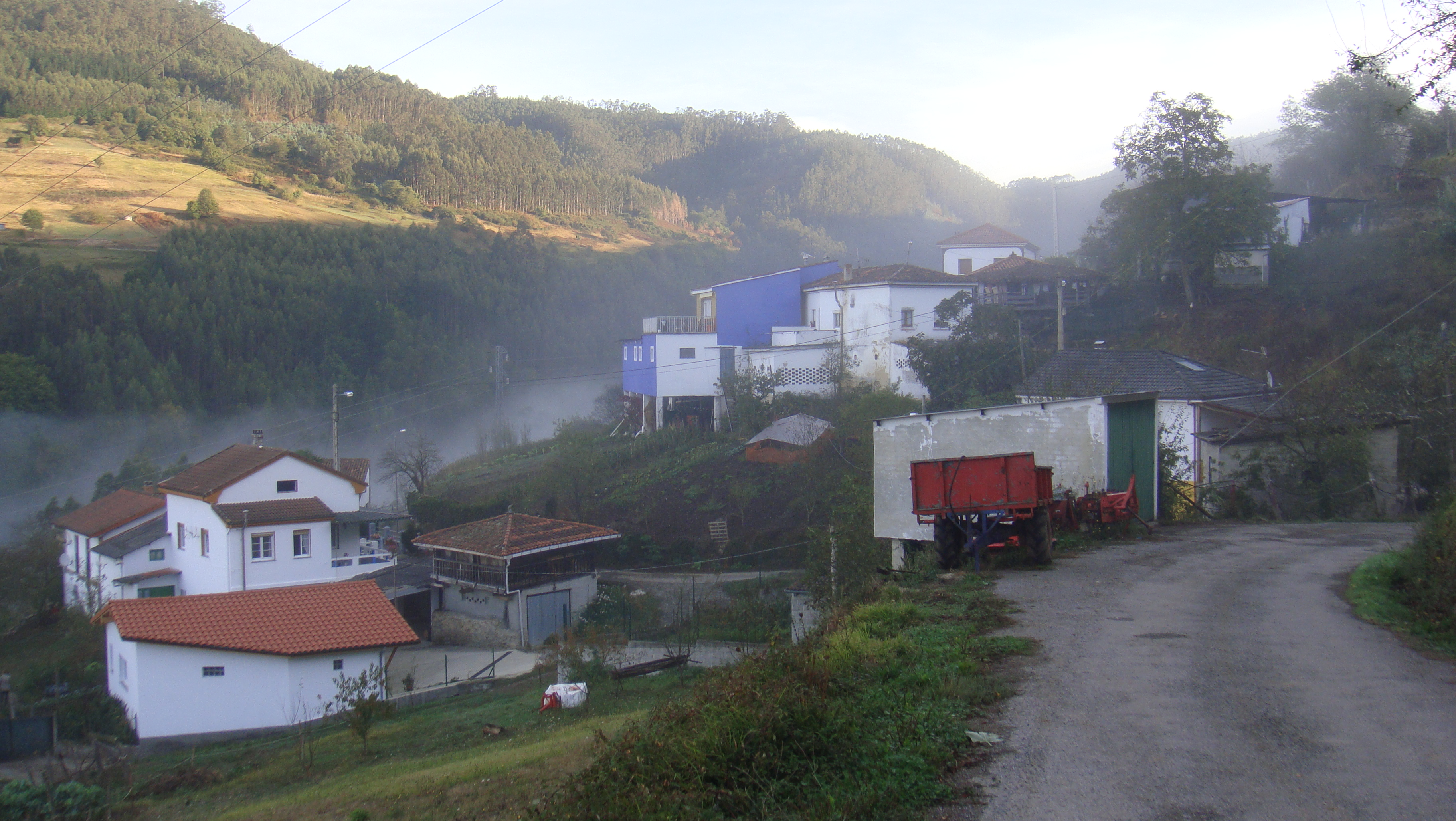 Aldea de Espinosa, en la parroquia de Fenolleda, concejo de Candamo, Asturias, España